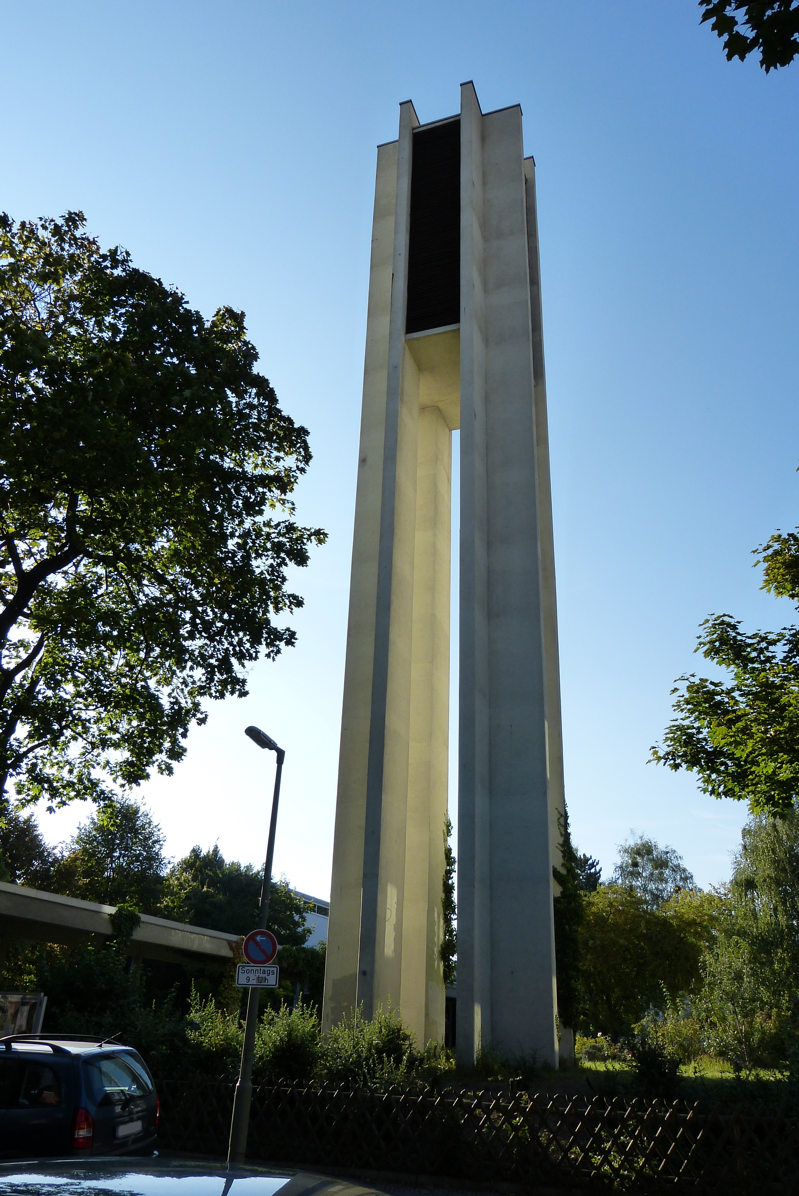 Berlin-Steglitz, Gritznerstr. 18/20, Treitschkestr. 31/33: Ev. Patmos-Kirche (Glockenturm)